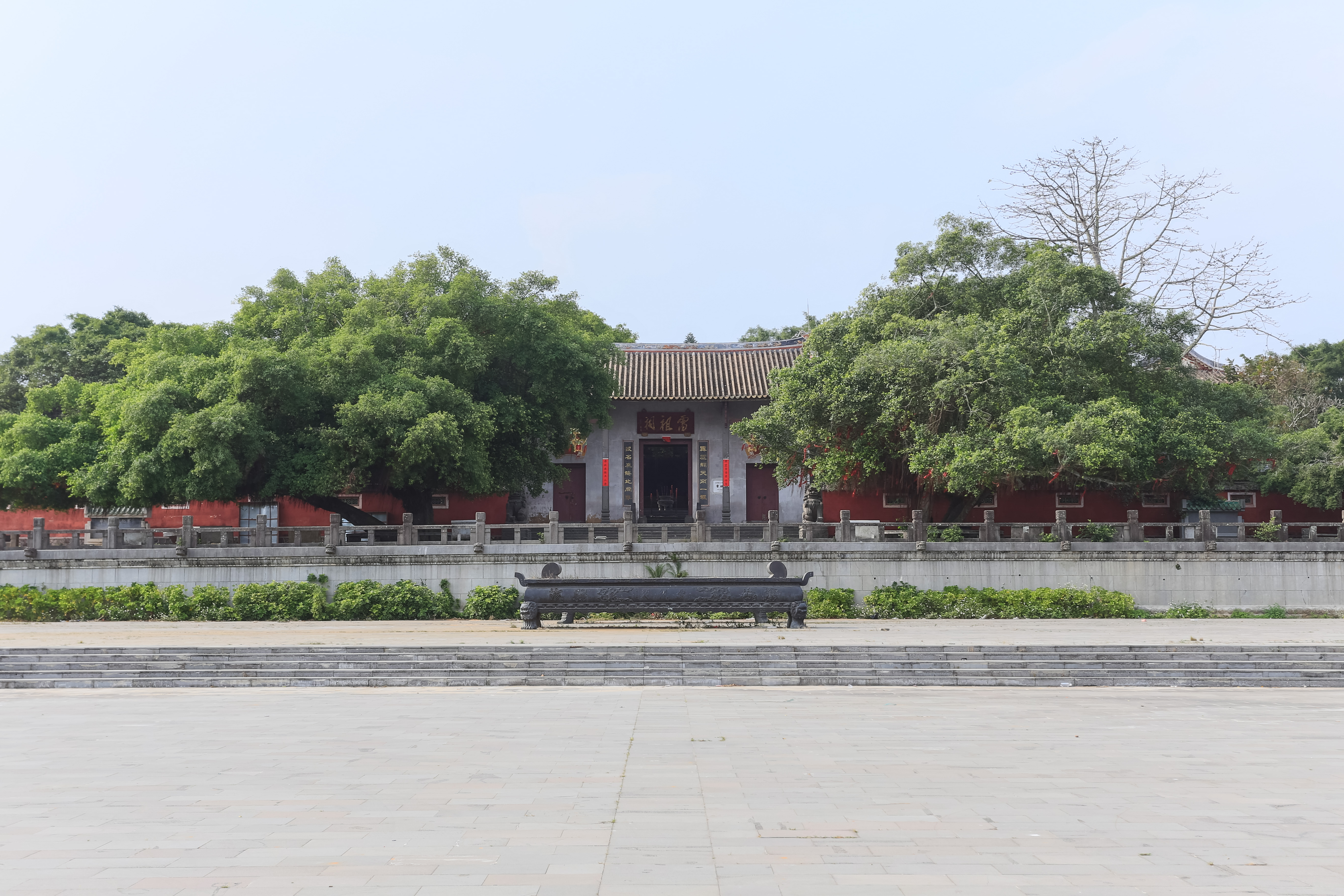 雷州雷祖祠